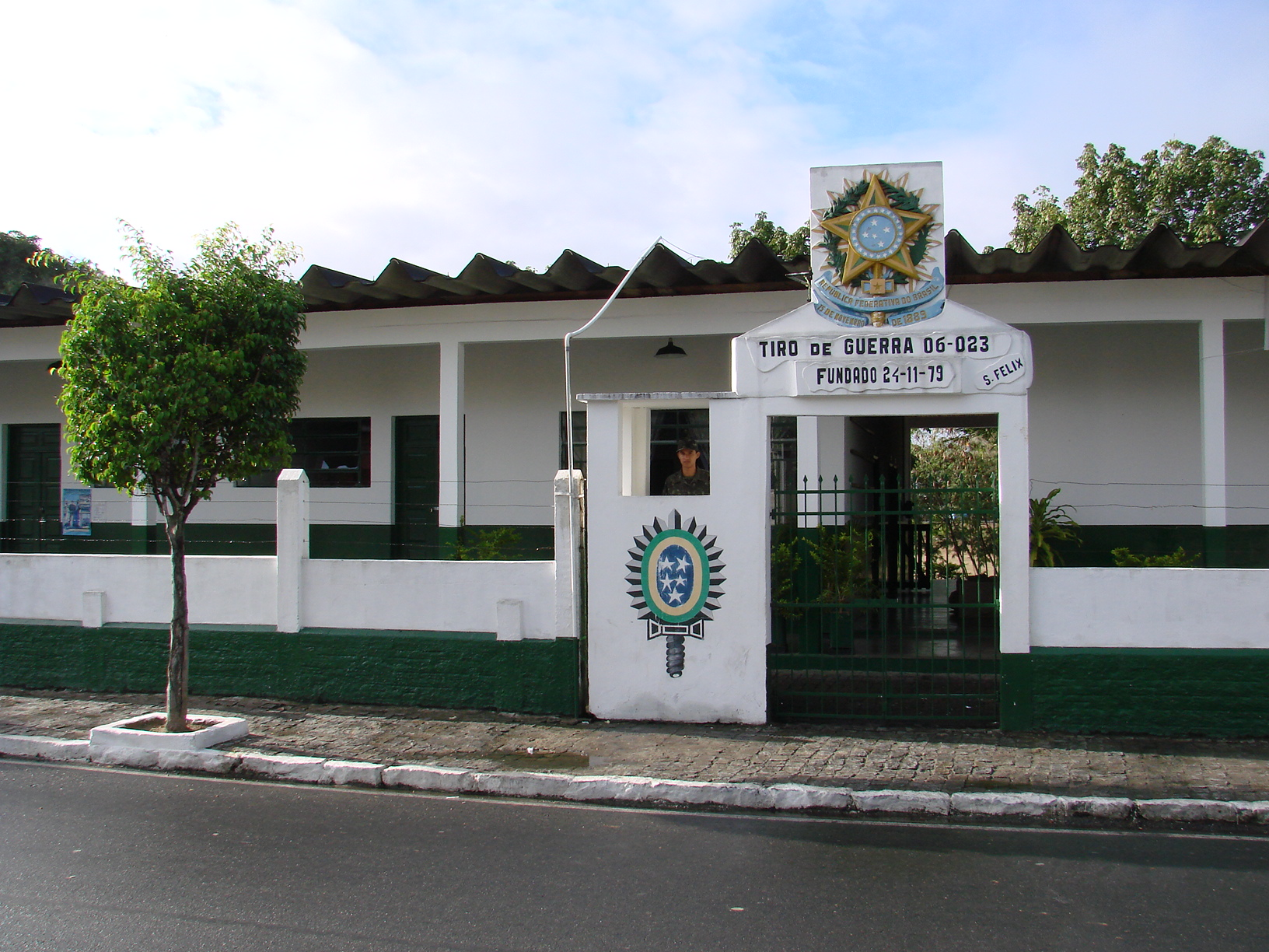 Fachada do TG 06/023 da 6ªRM